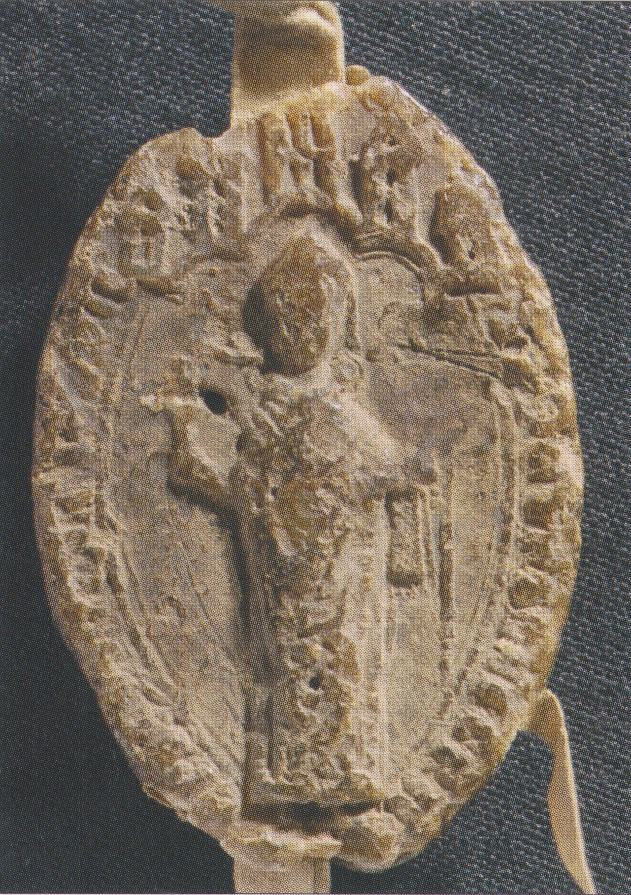 (II.) Tamás esztergomi érsek pecsétje, 1307 májusa